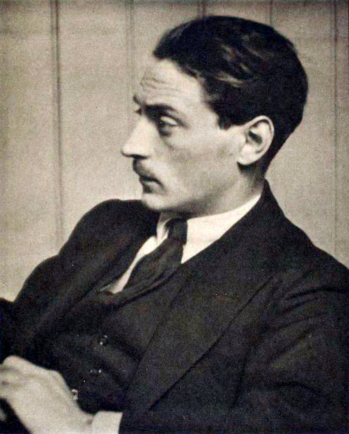 Compton Mackenzie, London, 6 November 1914